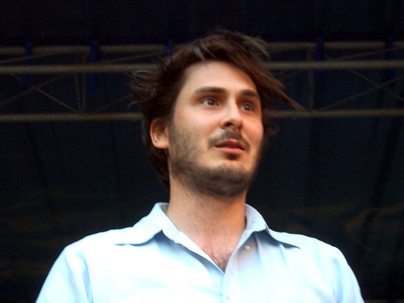 Tim Kinsella